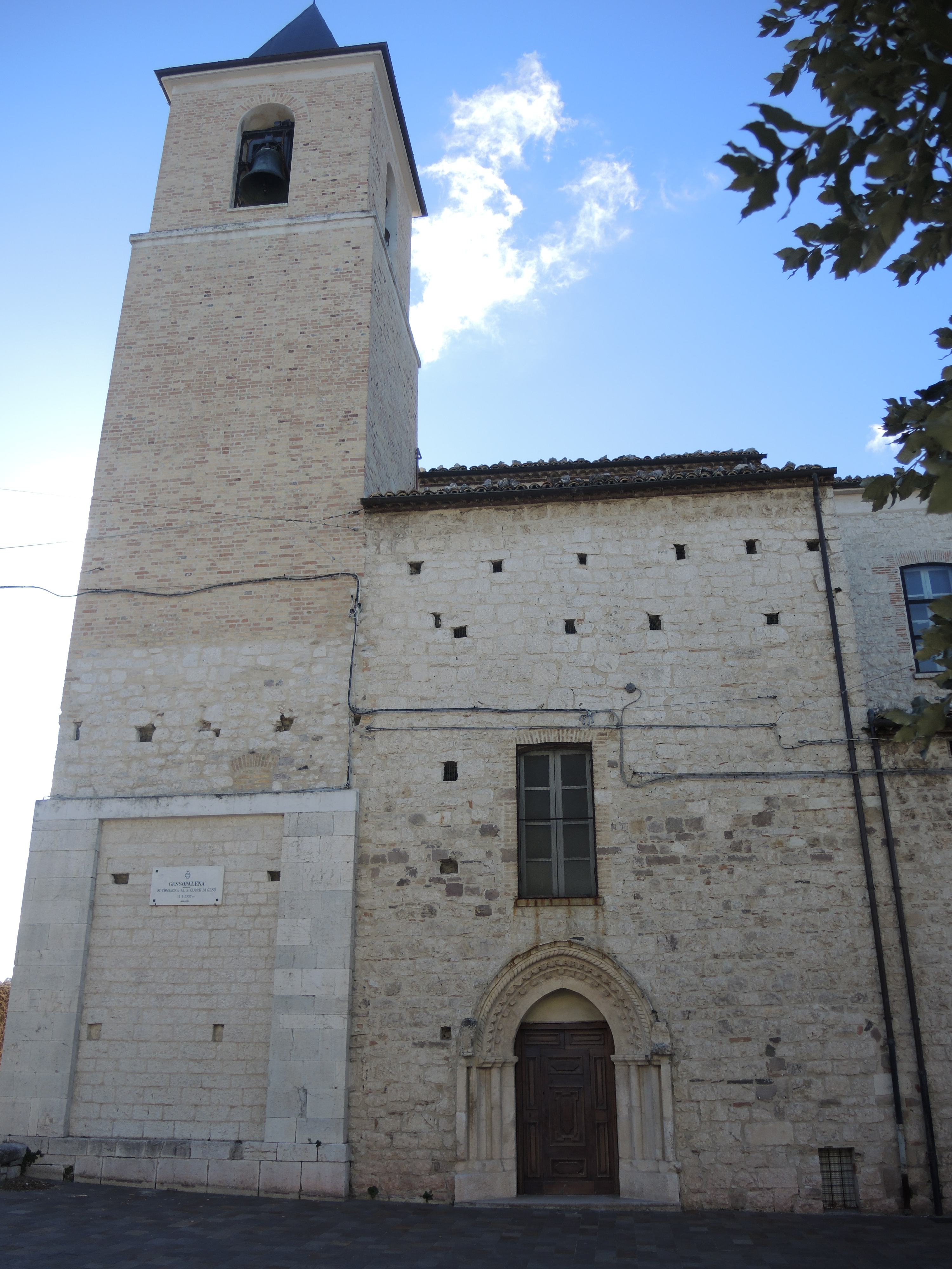 Gessopalena:Chiesa di Santa Maria Maggiore